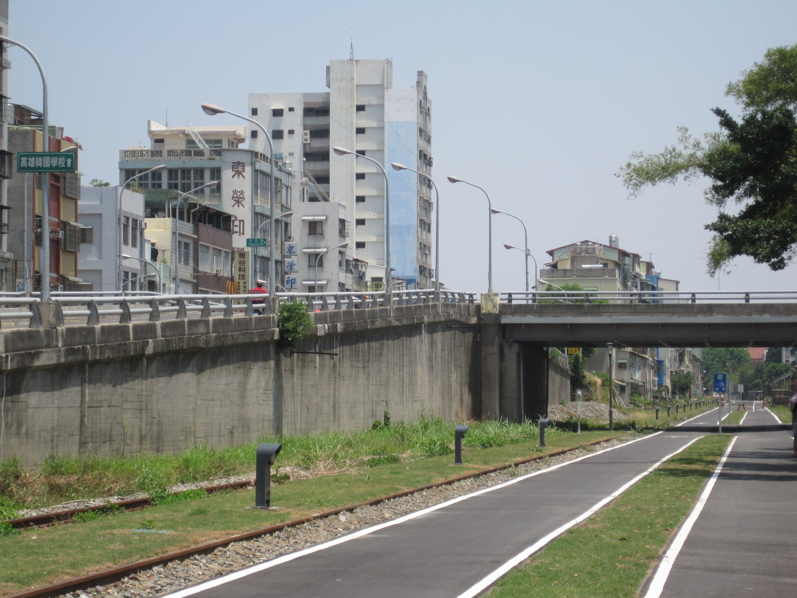 中文（台灣）: 2012到2013年拆除的大公陸橋，由南往北拍攝西側部分。